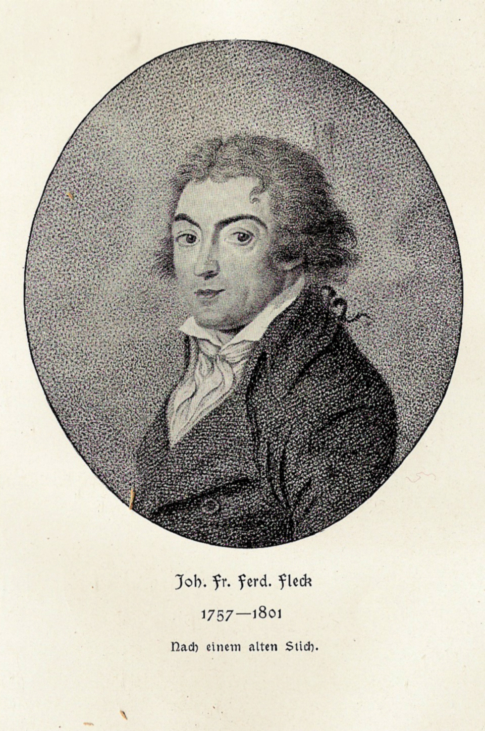 Porträt Ferdinand Fleck